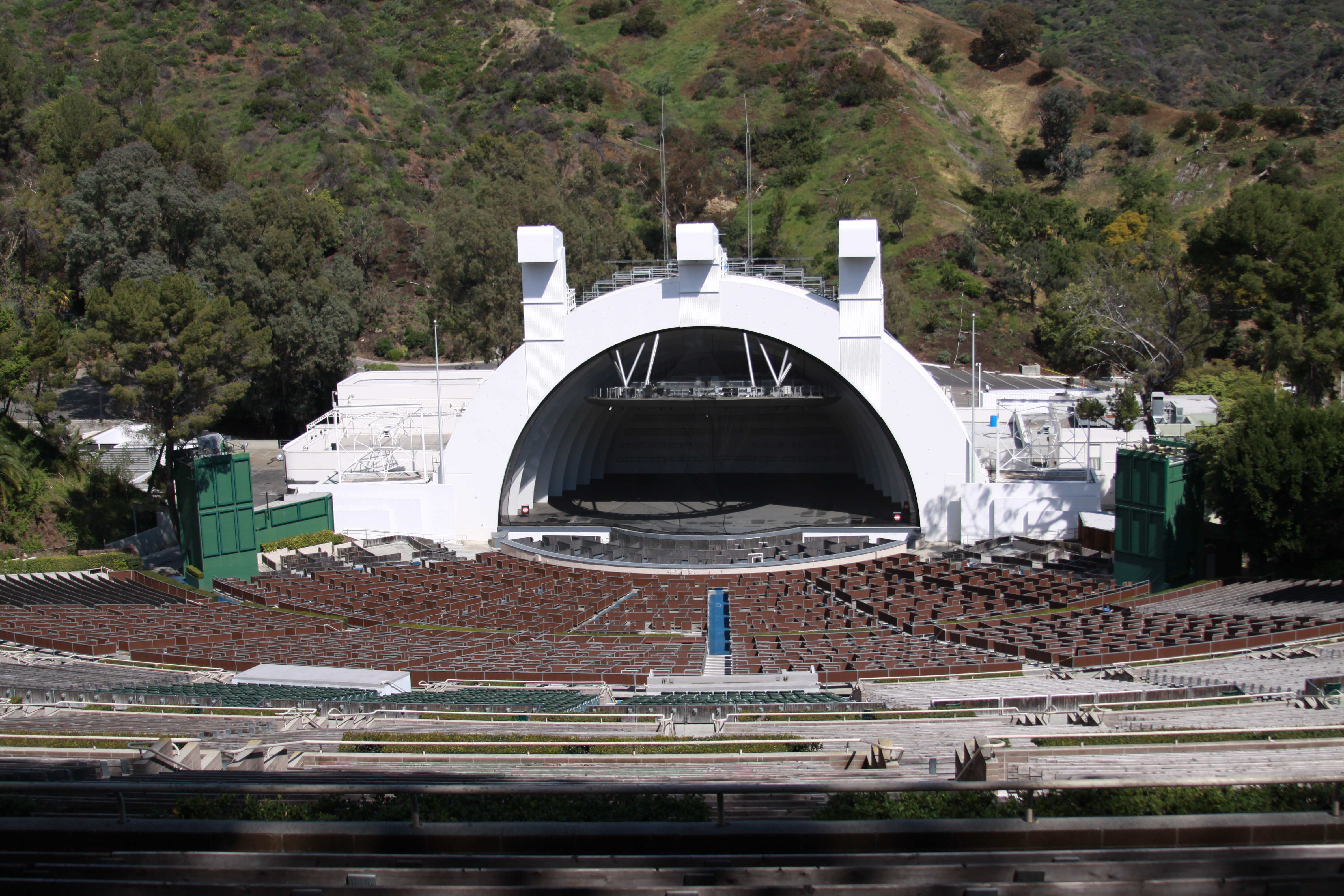 Hollywood Bowl